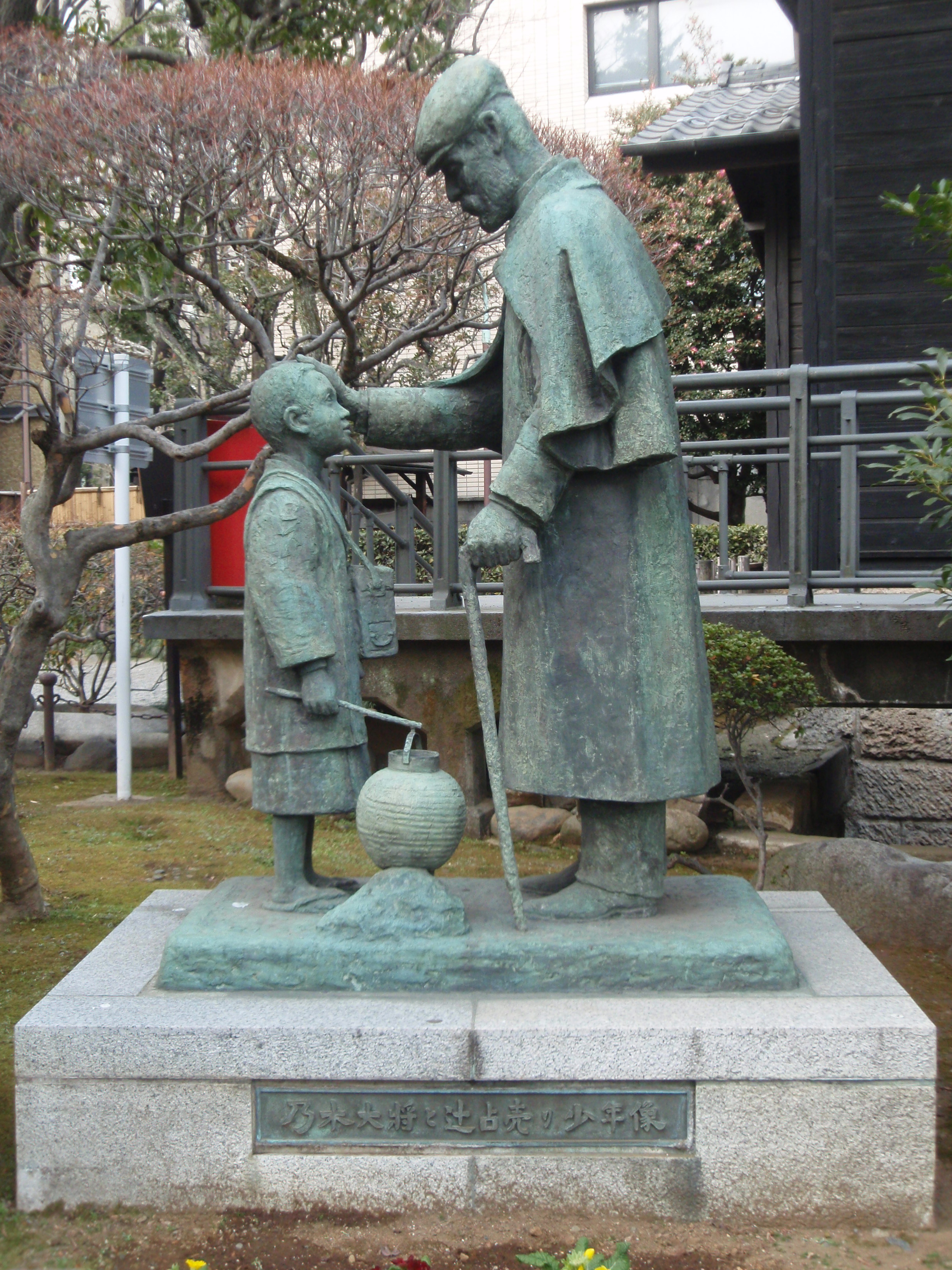 乃木将軍が辻占売りの少年に金二円を渡す様を表した像。